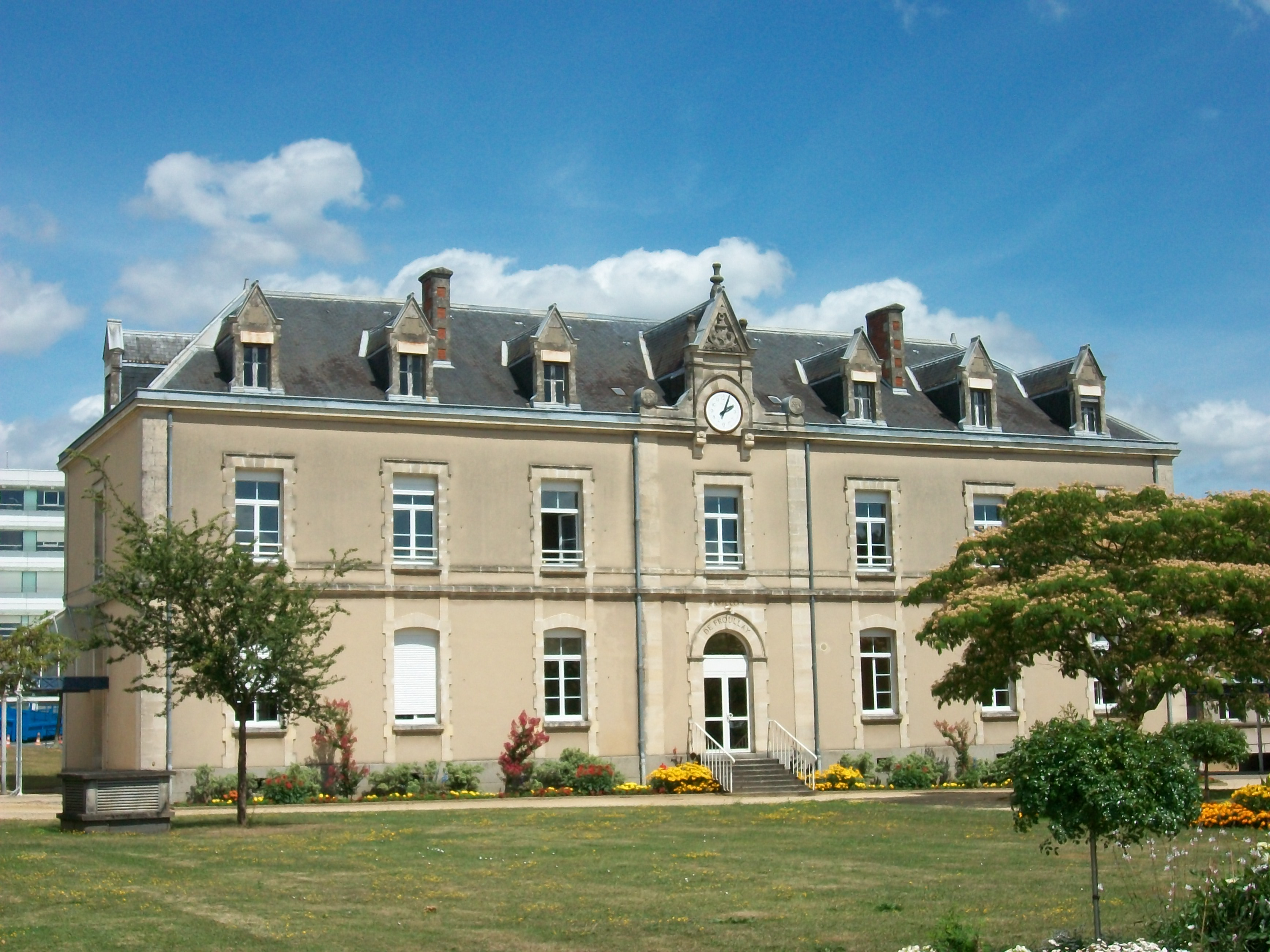 Au centre de l'hôpital du Mans, un ancien hôtel particulier ayant servi de base à la construction de la structure globales du centre hôspitalier.